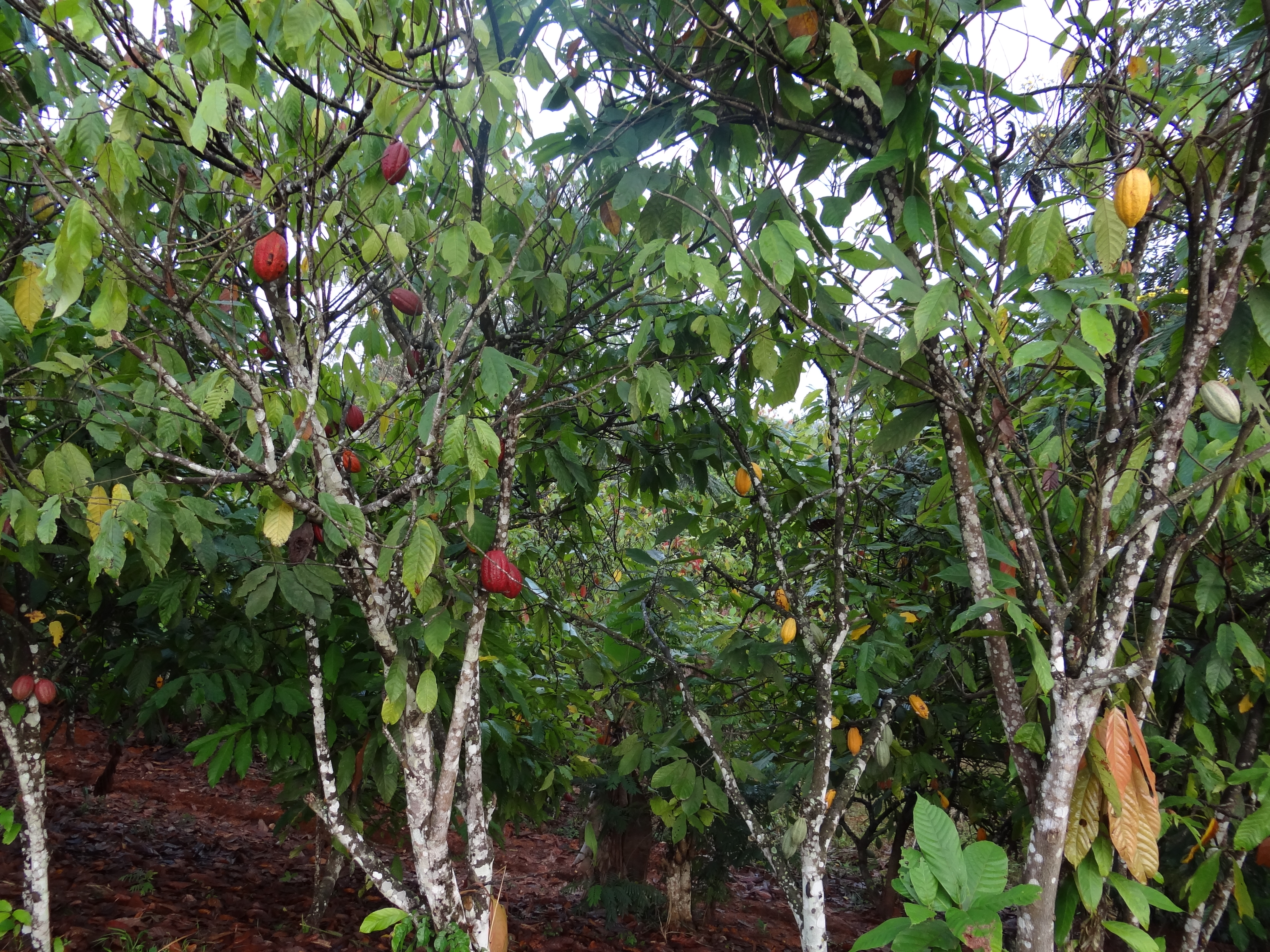 פירות עץ הקקאו בצבעים שונים במטע קקאו בחוף השנהב בין פואקה לבונדוקו This is an image of food from Ivory Coast